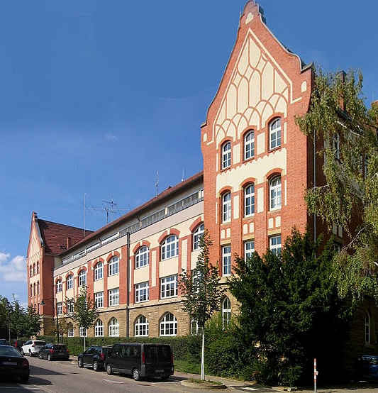 Schule im Osterholz Ludwigsburg